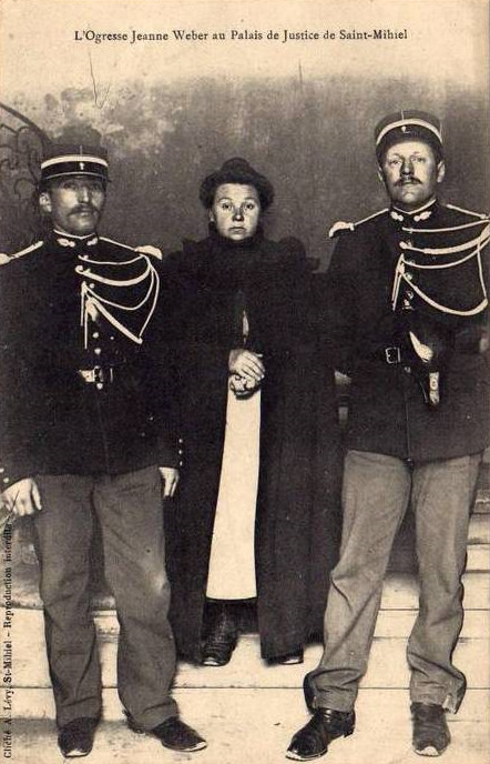 carte postale de 1908 présentant Jeanne Weber l'ogresse entre deux gendarmes au palais de justice de Saint-Mihiel. Photographe : A. Lévy de Saint-Mihiel.